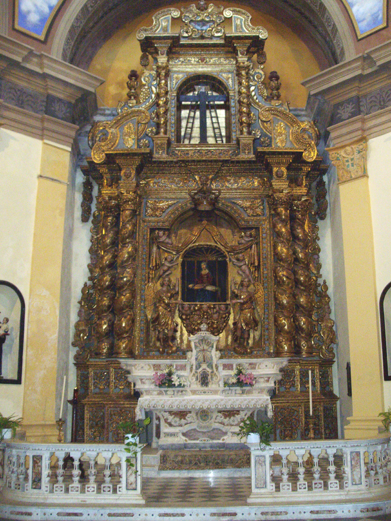 cappella della Pietà nella chiesa del Santo Sepolcro - Cagliari